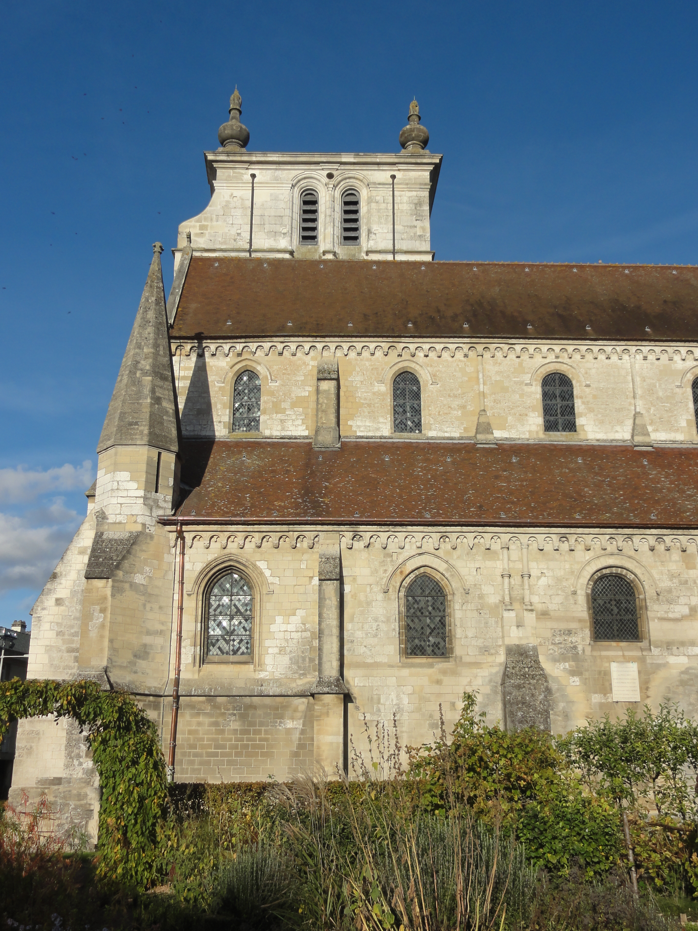 Vue partielle depuis le sud.